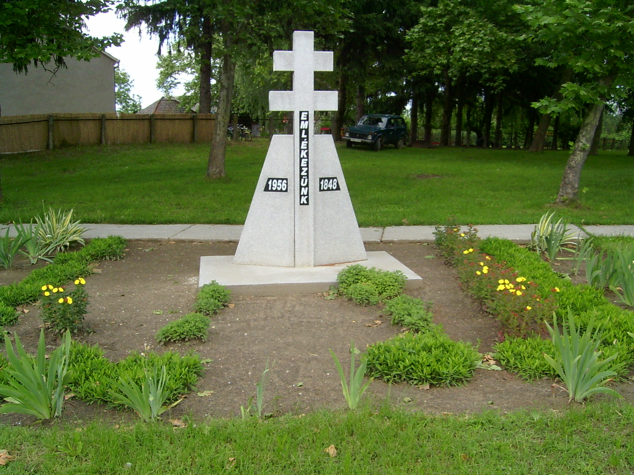 Mezőcsokonya, emlékmű